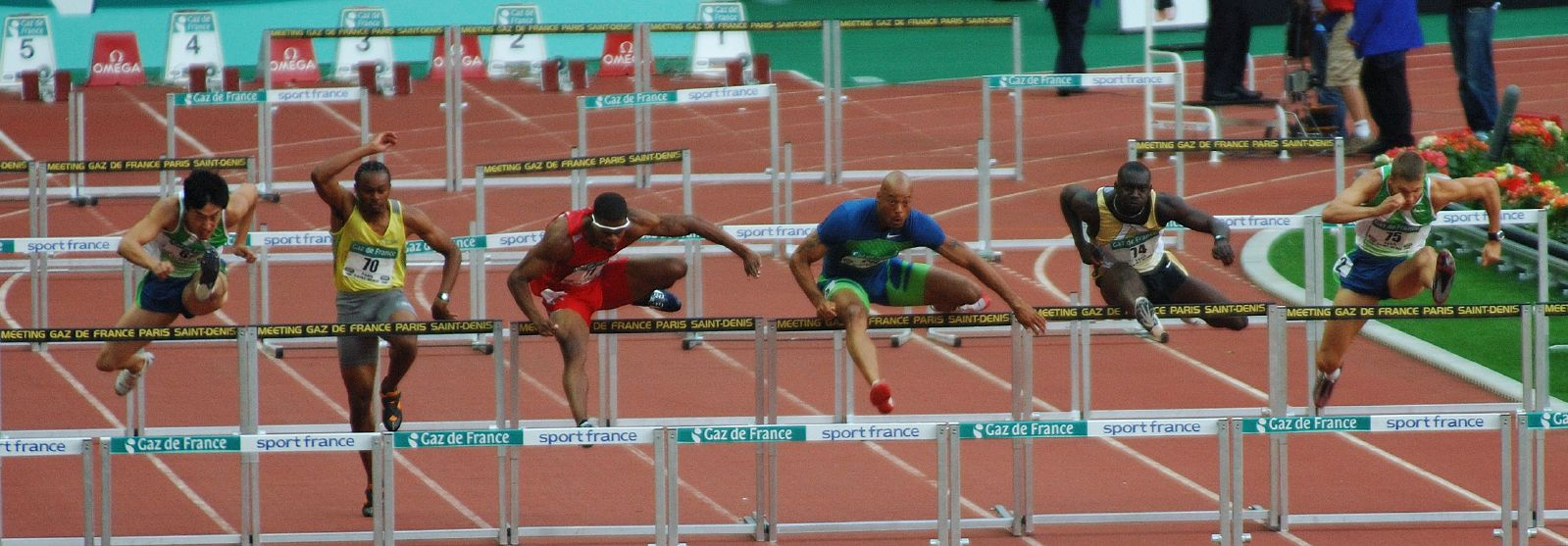 110 m hurdles with Doucouré, Xiang, Trammell, Merritt. Golden League 2006, Gaz de France, Paris Saint-Denis result